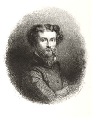 Antica stampa ottocentesca raffigurante lo scrittore francese Louis Enault